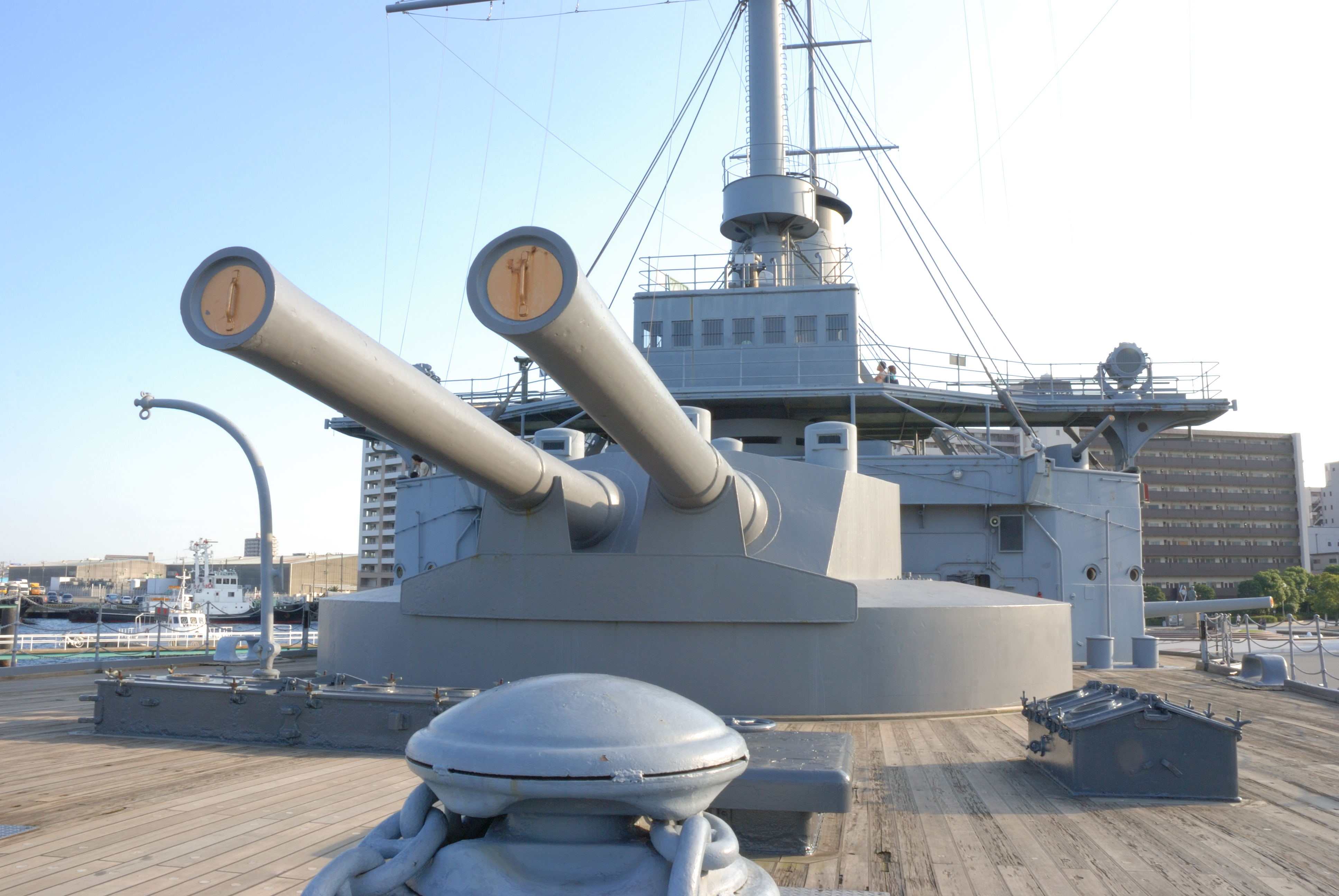 Mikasa zenbu shuho